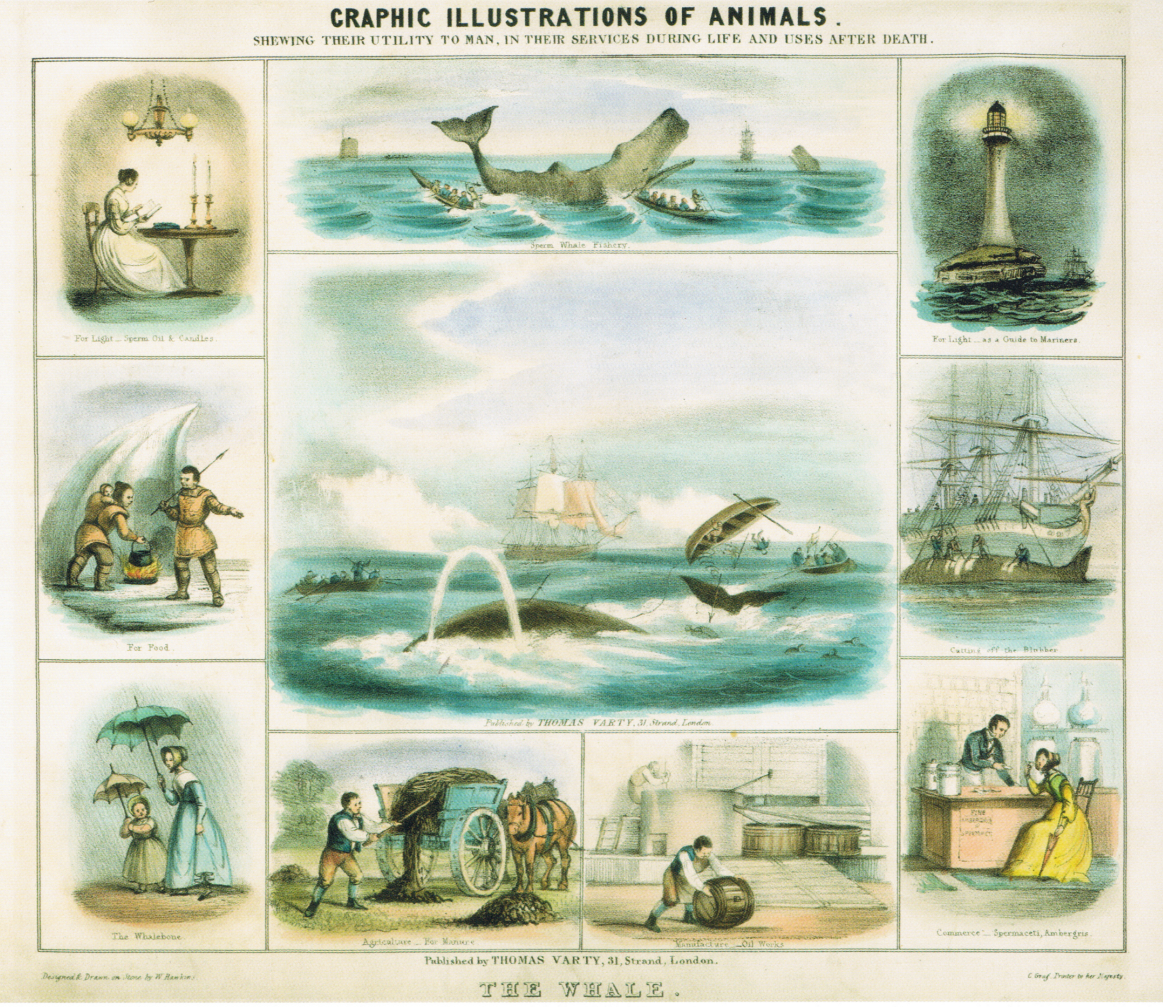 Der Wal und seine Produkte, Bidermeierische Lithografie aus Groß Britanien um 1900